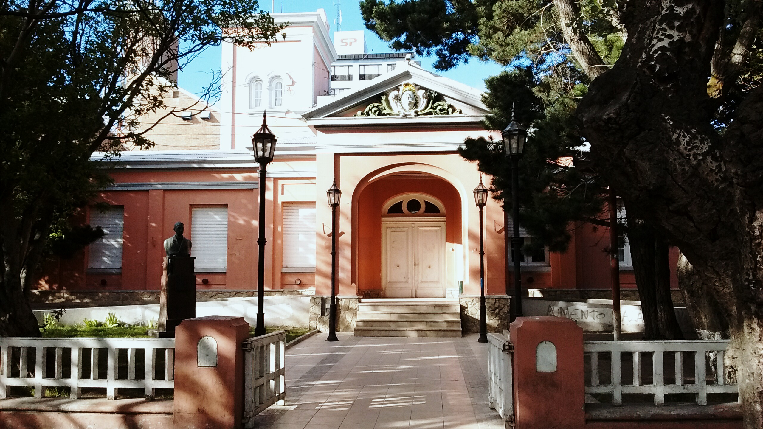 Casa de Gobierno de la Provincia de Santa Cruz. Alcorta 231, Río Gallegos.